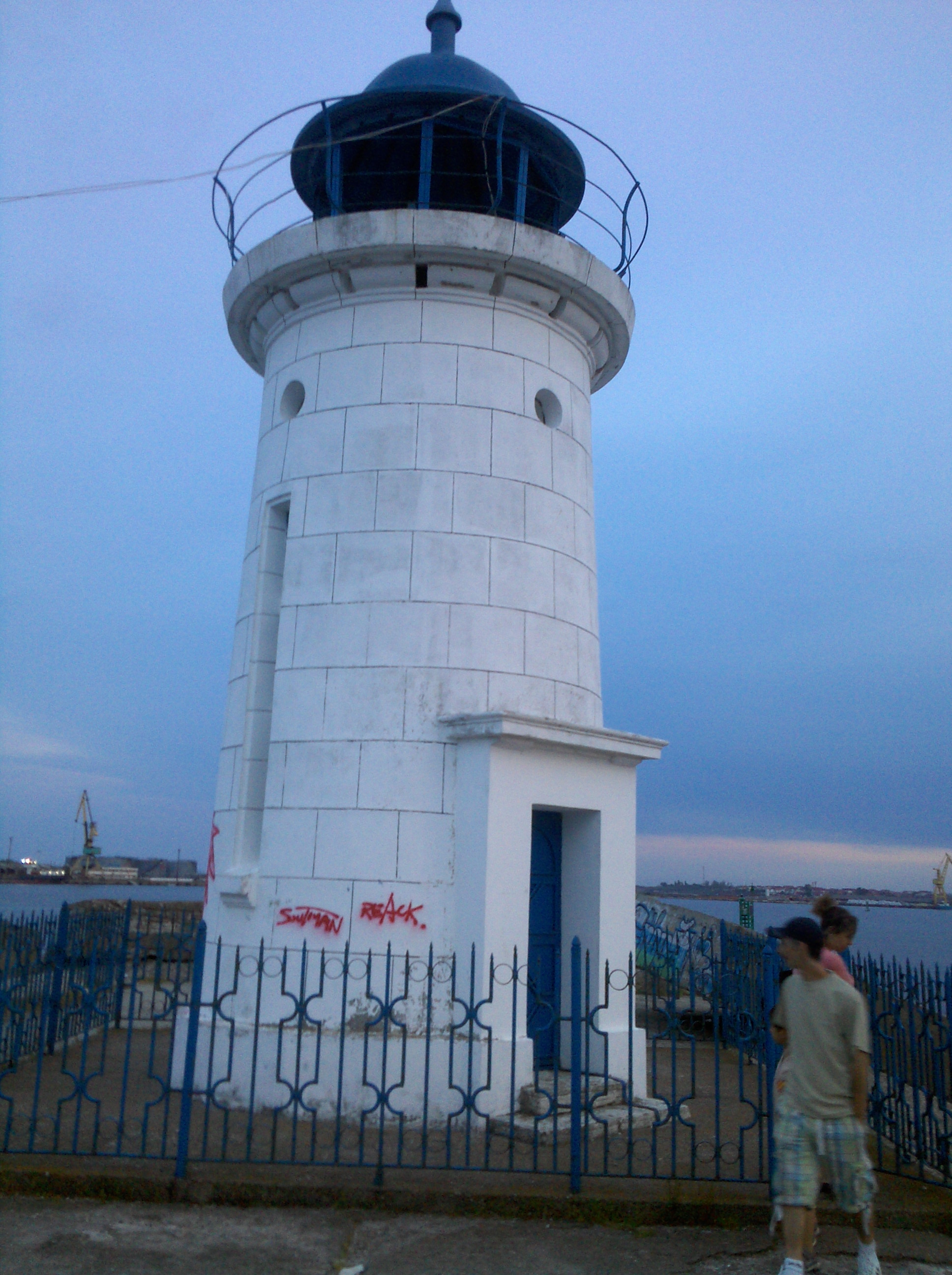 el antiguo farro de Mangalia